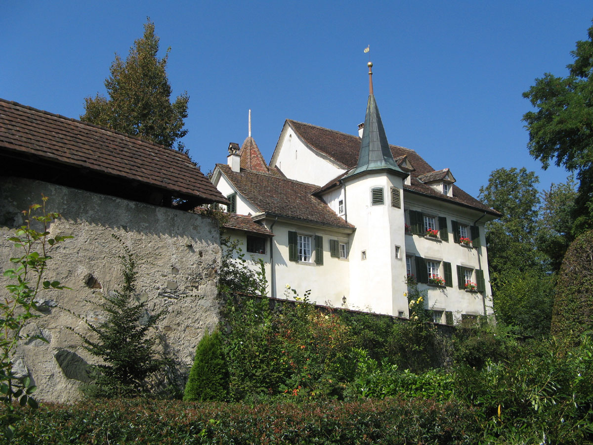 Schlössli in Bremgarten, links ein Teil der Stadtmauer